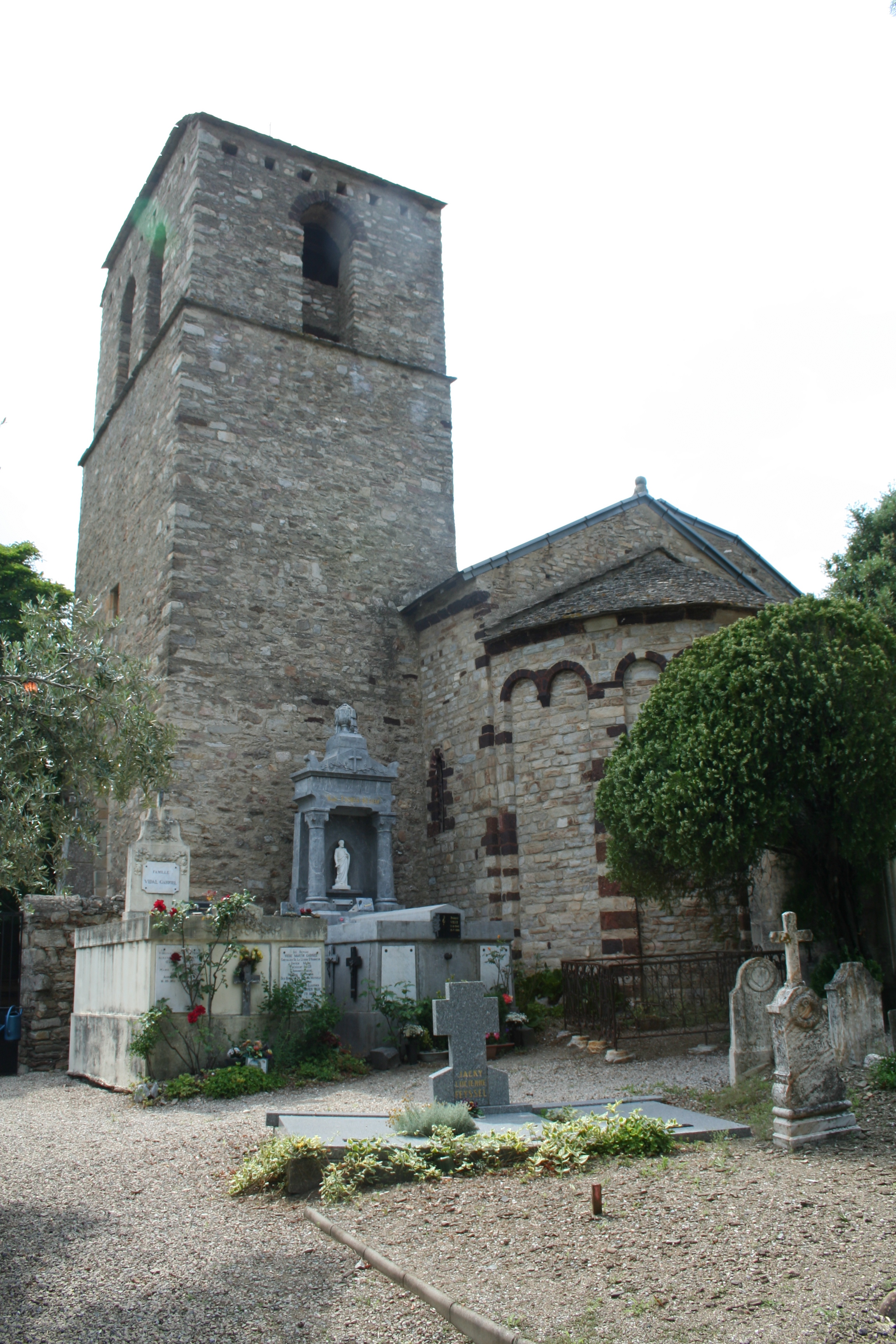 Saint-Julien (Hérault) - Chevet du prieuré.